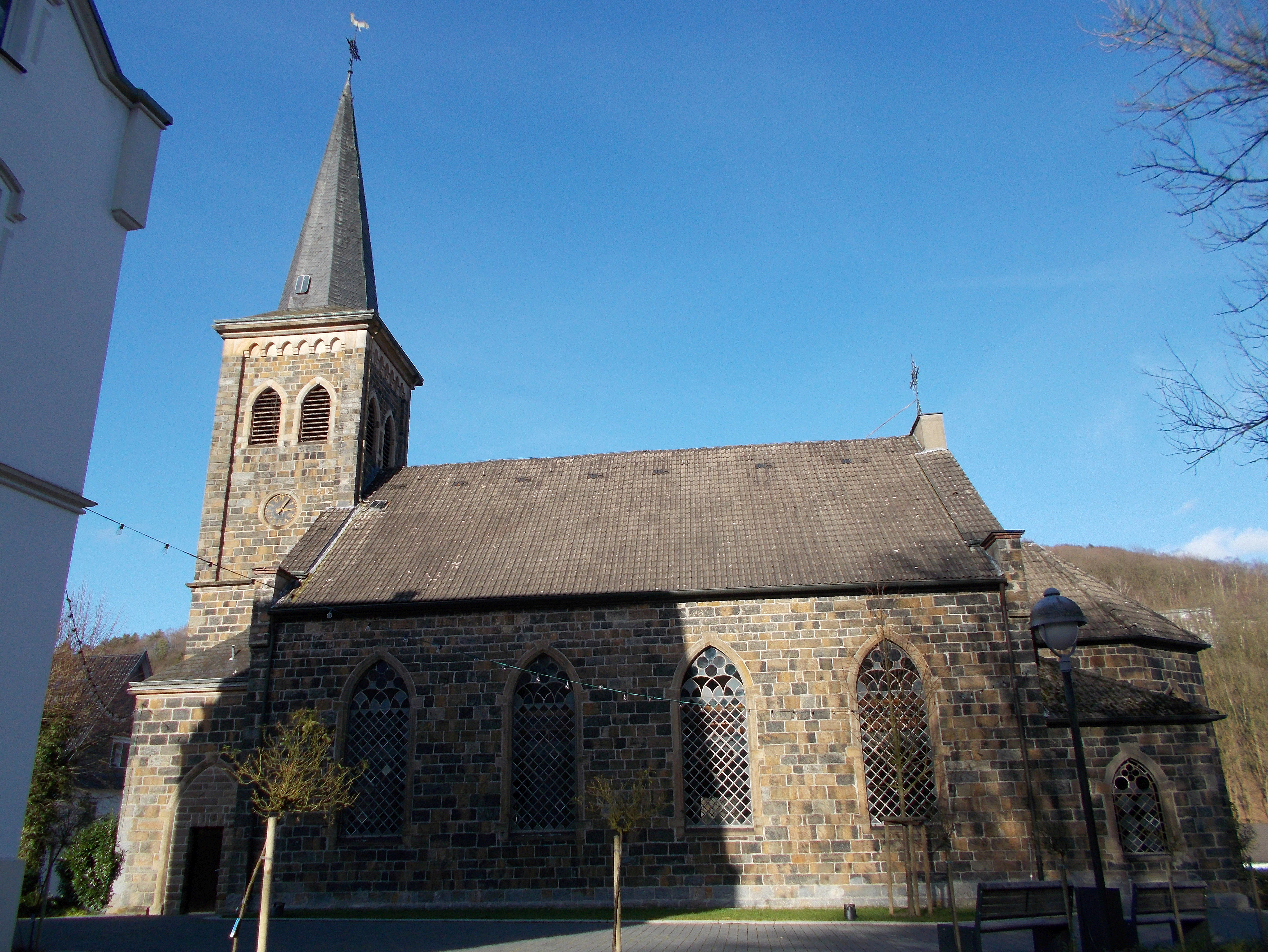 Südseite Erlöserkirche in Schalksmühle, Germany